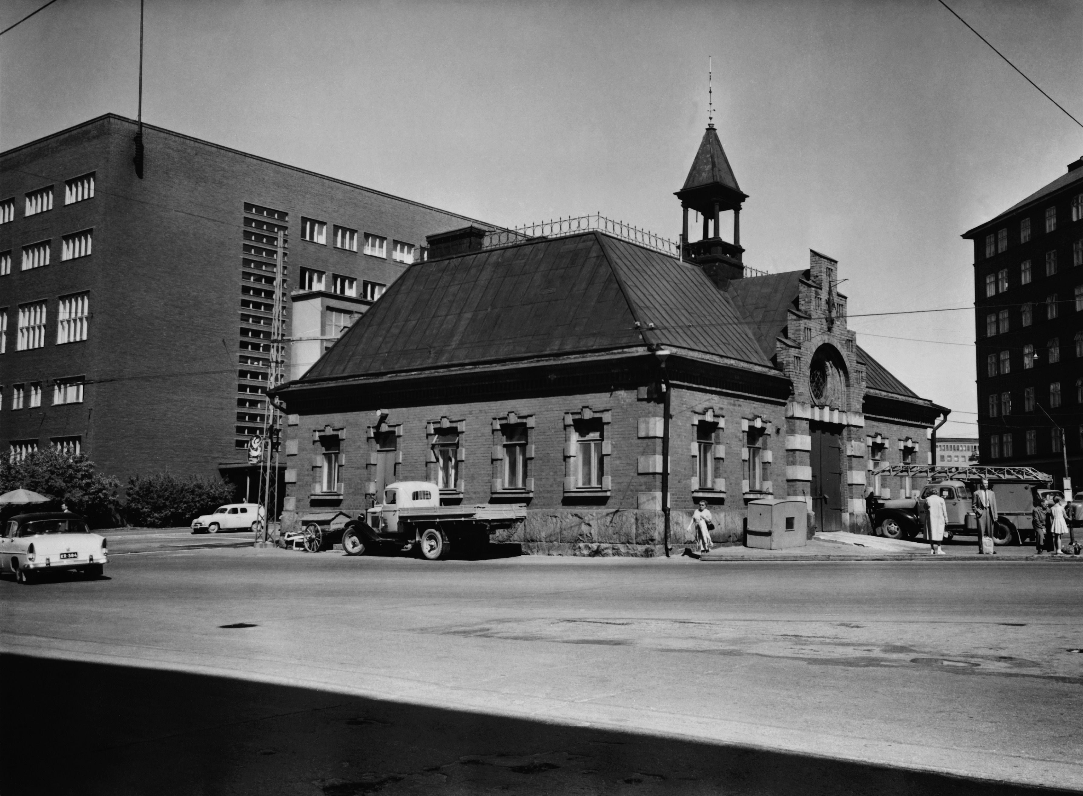 Kampin paloasema, Kampin tori. Paloaseman on suunnitellut Magnus Scherfbeck, 1893. Purettu 1960-luvulla.